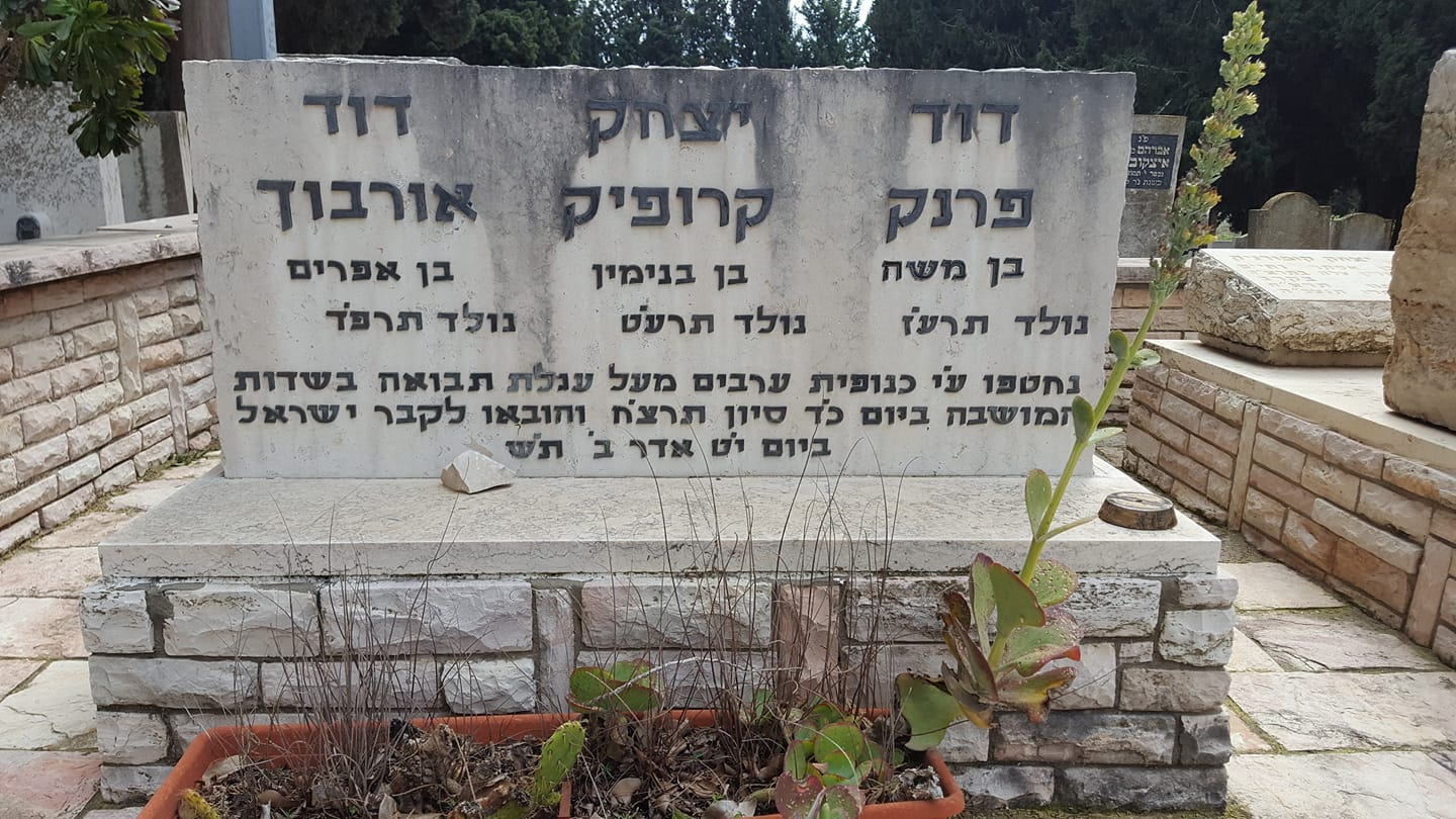 קבר אחים של ,דוד פרנק, יצחק קרופיק ודוד אורבוך בית העלמין בגבעת עדה. שלושה צעירים שנחטפו בשנת 1938 בשדות המושבה גבעת עדה ונרצחו